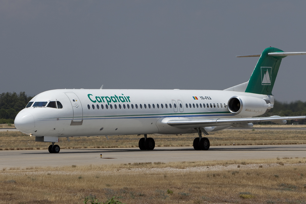 YR-FKA FK100 Carpatair